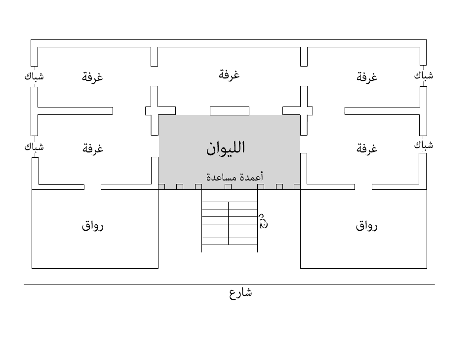 مخطط لبيت الليوان